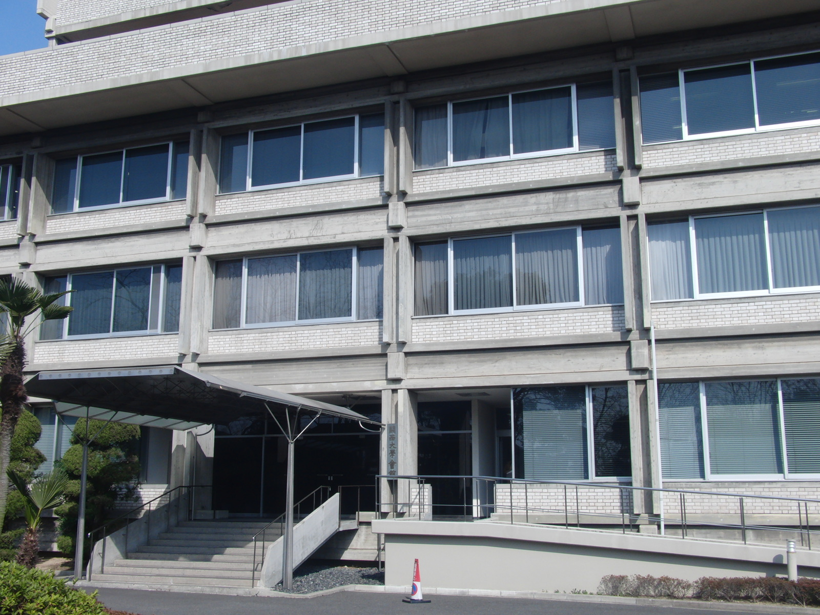 関西大学会館を撮影